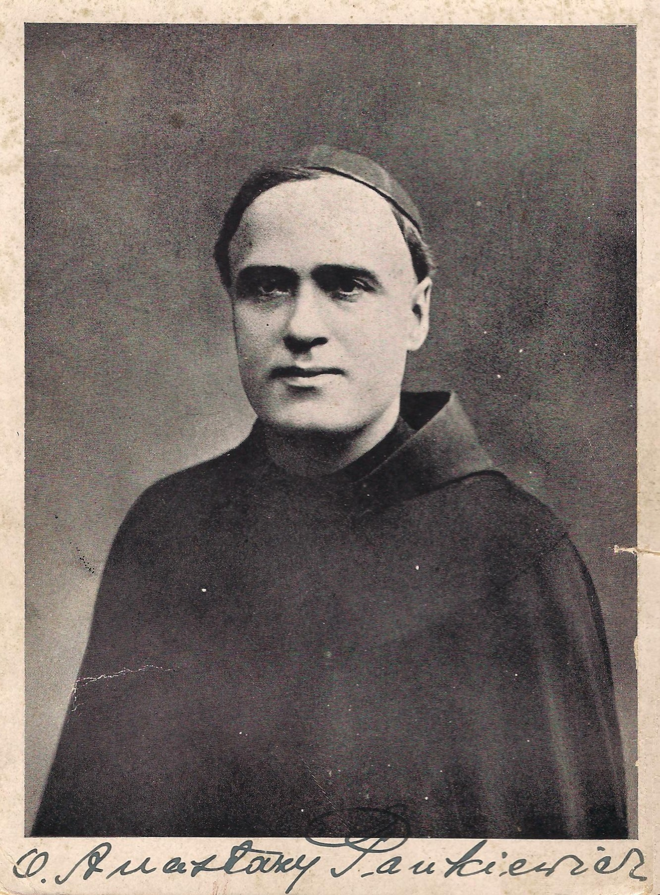 Franziskanerpater Anastazy Jakub Pankiewicz, Opfer des Holocaust